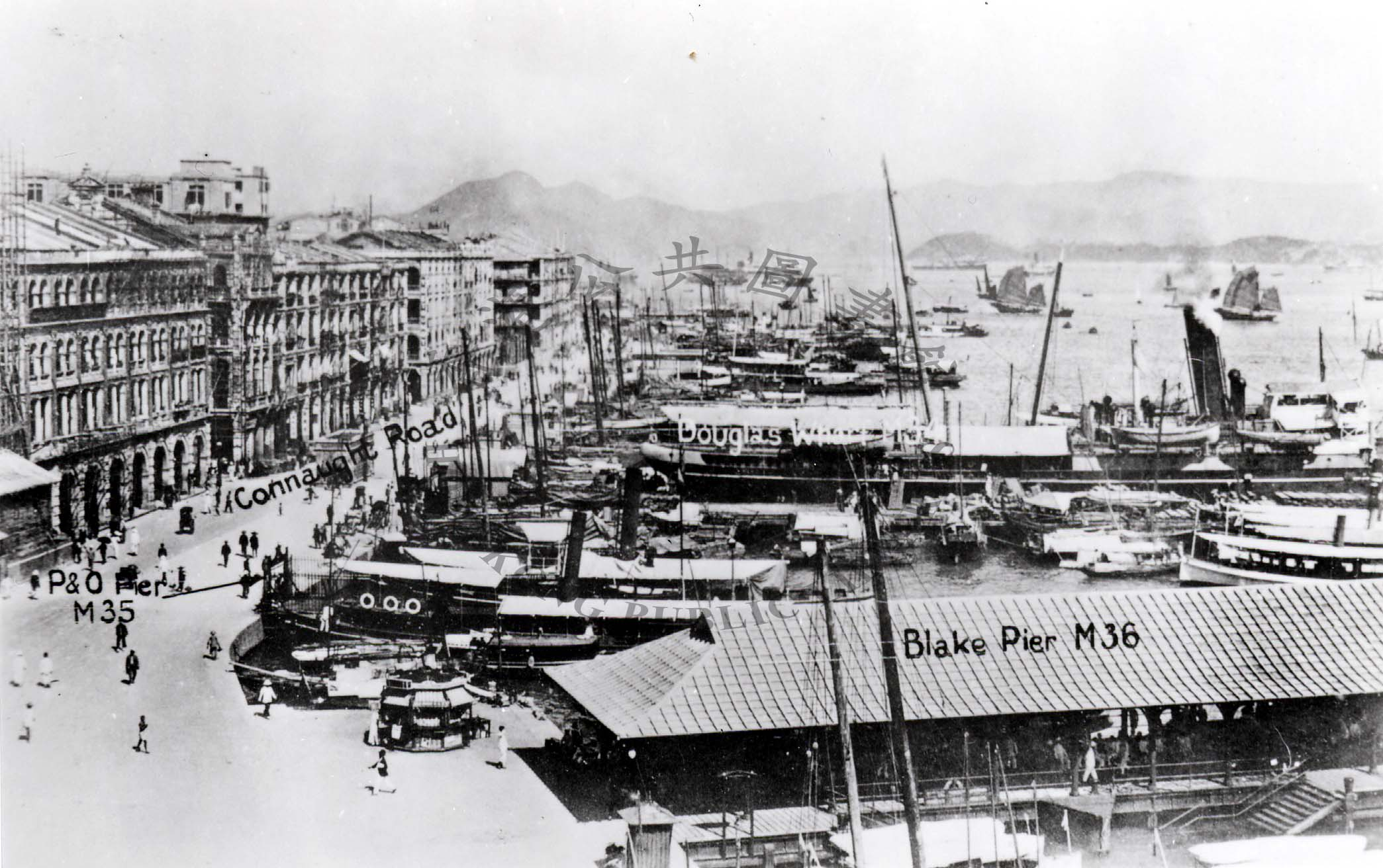 中文（香港）: 維多利亞城向西瞭望卜公碼頭至干諾道。